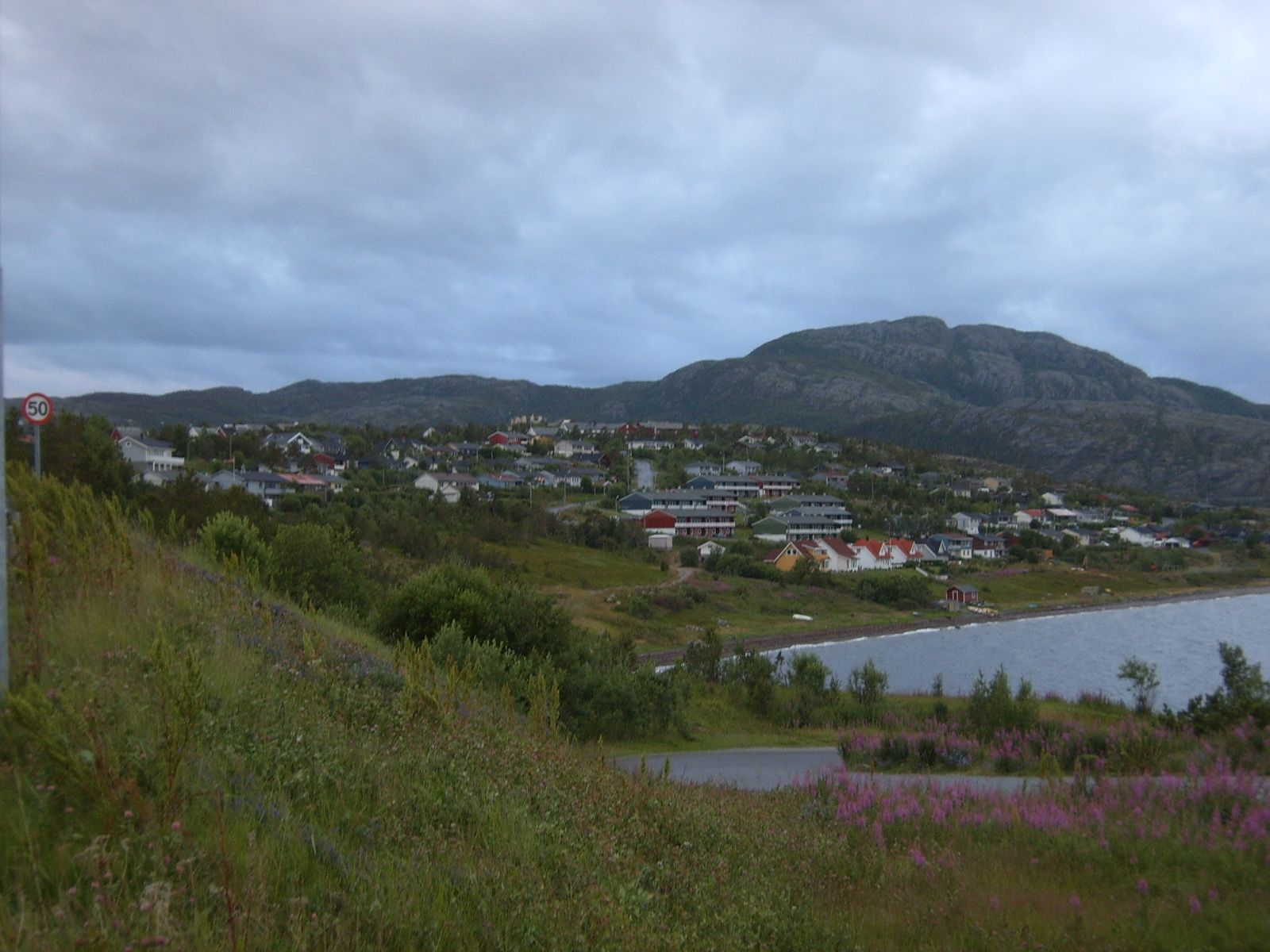 Hentet fra fransk wikipedia, beskrivelse derfra: Quartiers résidentiels d'Alta, en bordure de l'Altafjord. July 2005 Personal picture, I set it in public domain. Tatt av: Vberger